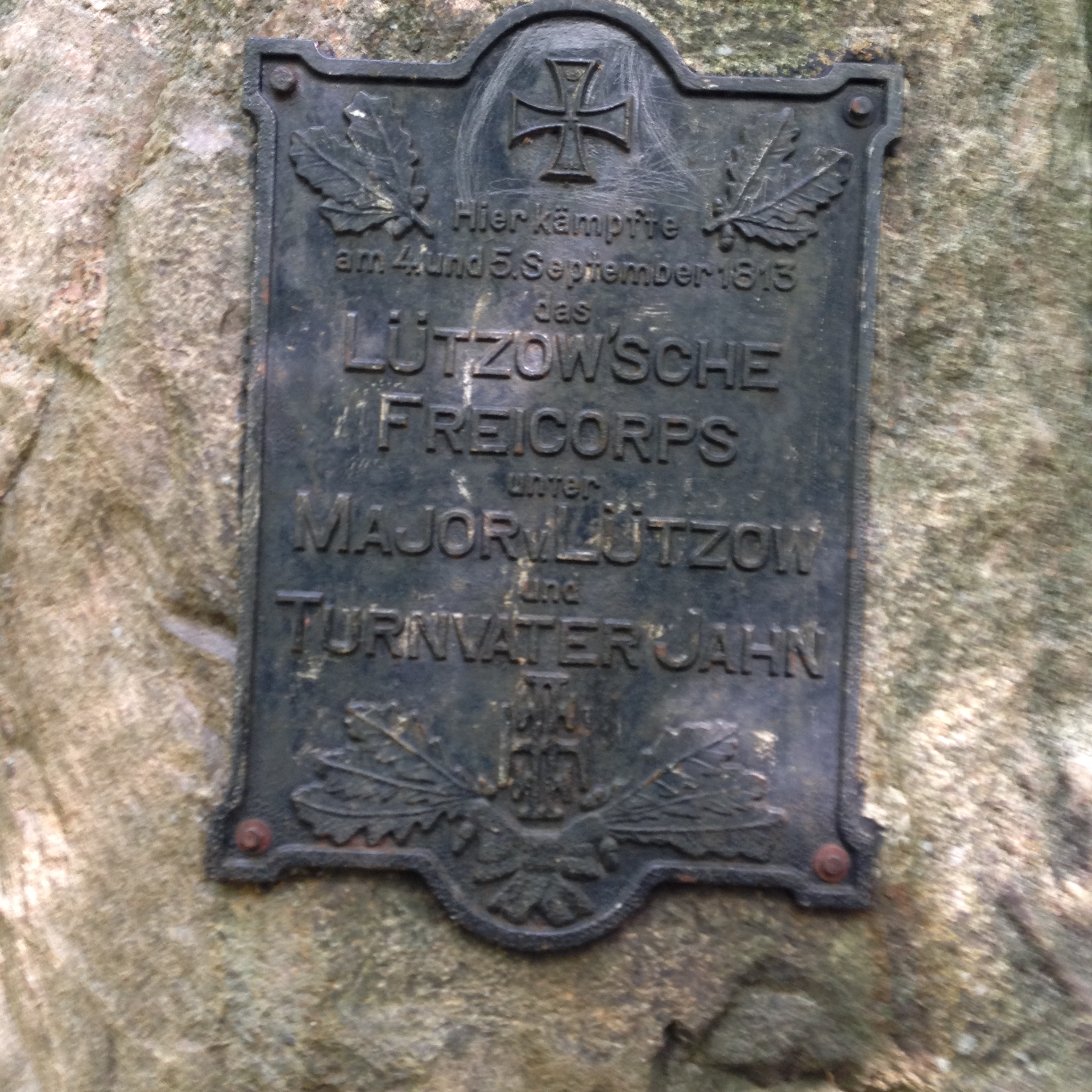 Denkmal an das Gefecht der Lützower Jäger (darunter Turnvater Jahn) 1813 am Lütauer See bei Mölln